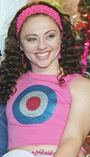 Guta Stresser, film actress